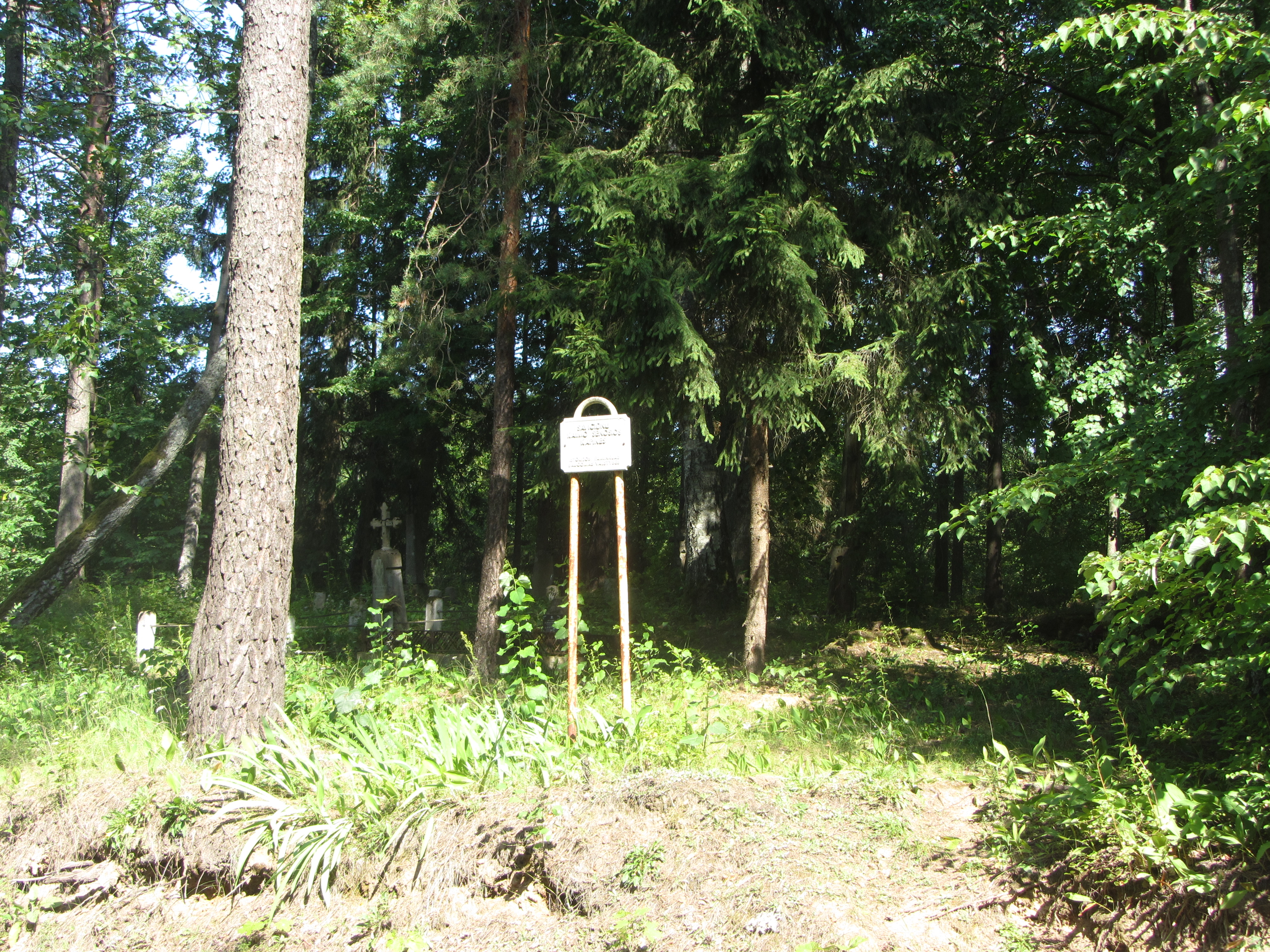 Degučių sen., Lithuania